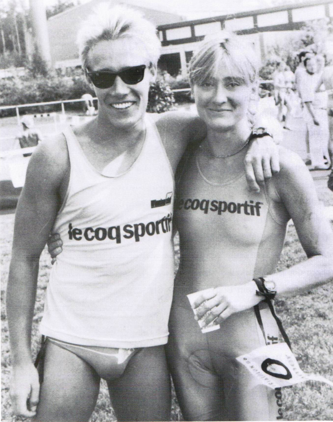 DM 86 Roth D.Aschmoneit und A.Kremer